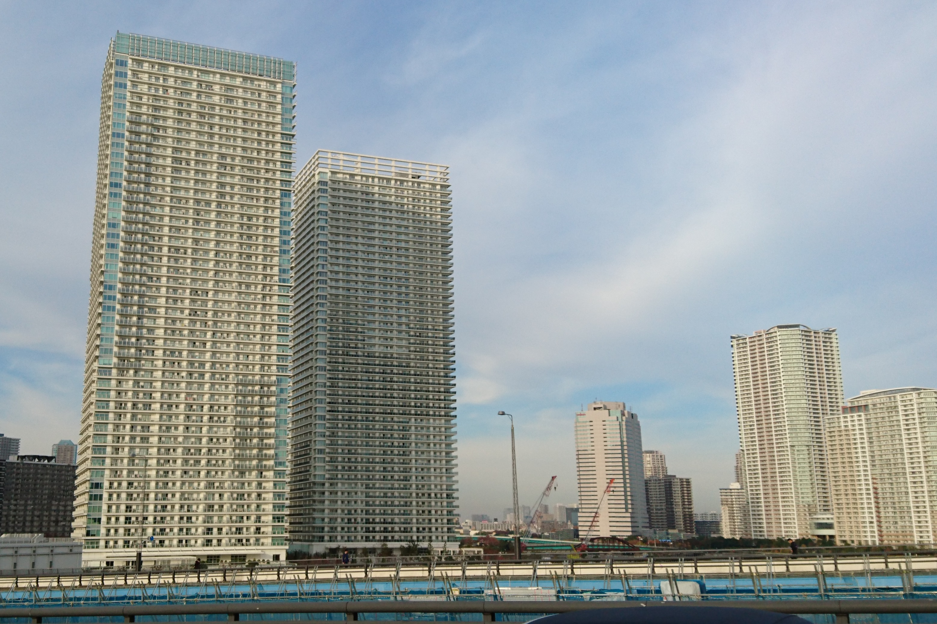 ザ・パークハウス晴海タワーズ